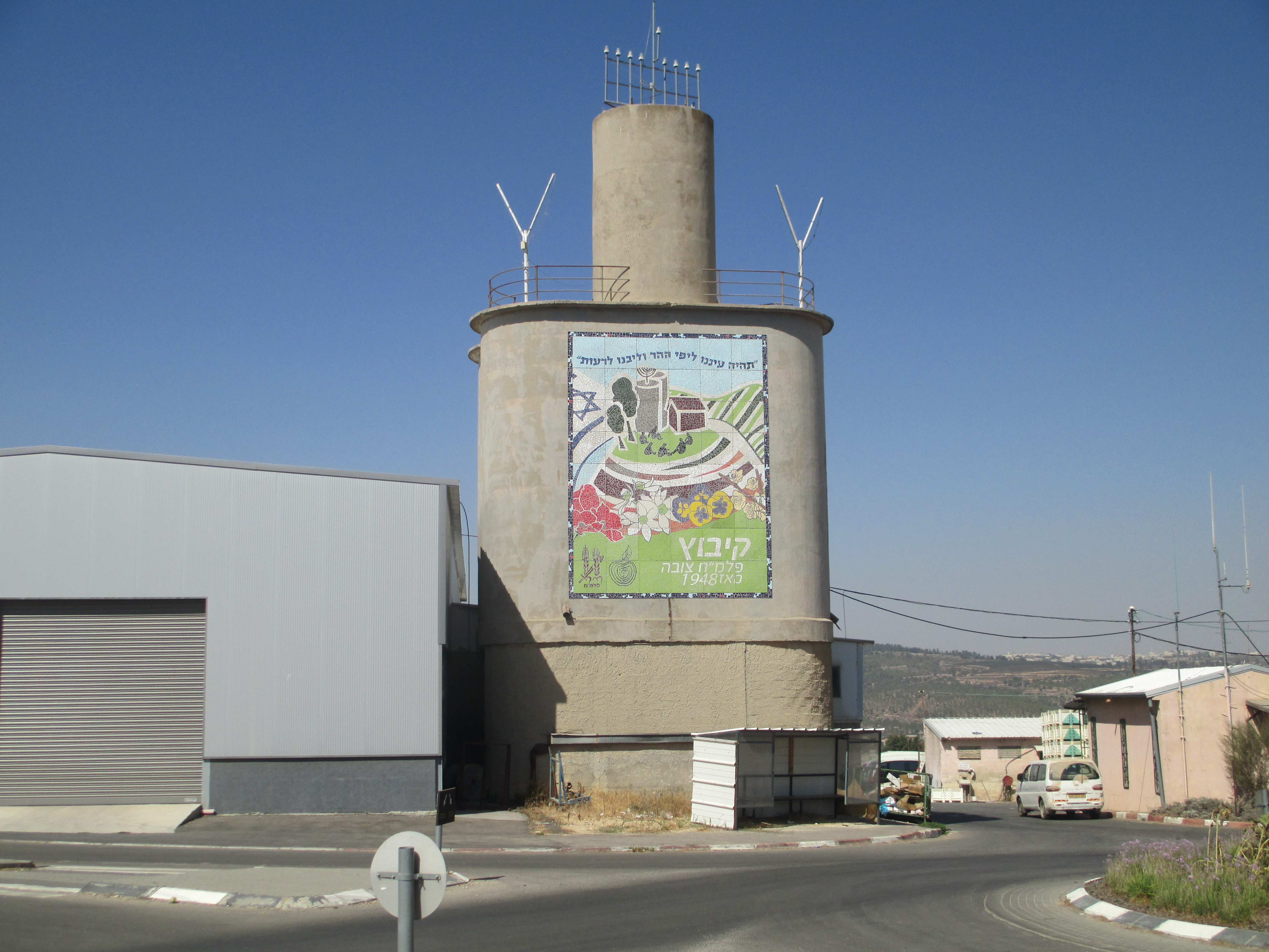 מגדל סילו בקיבוץ צובה